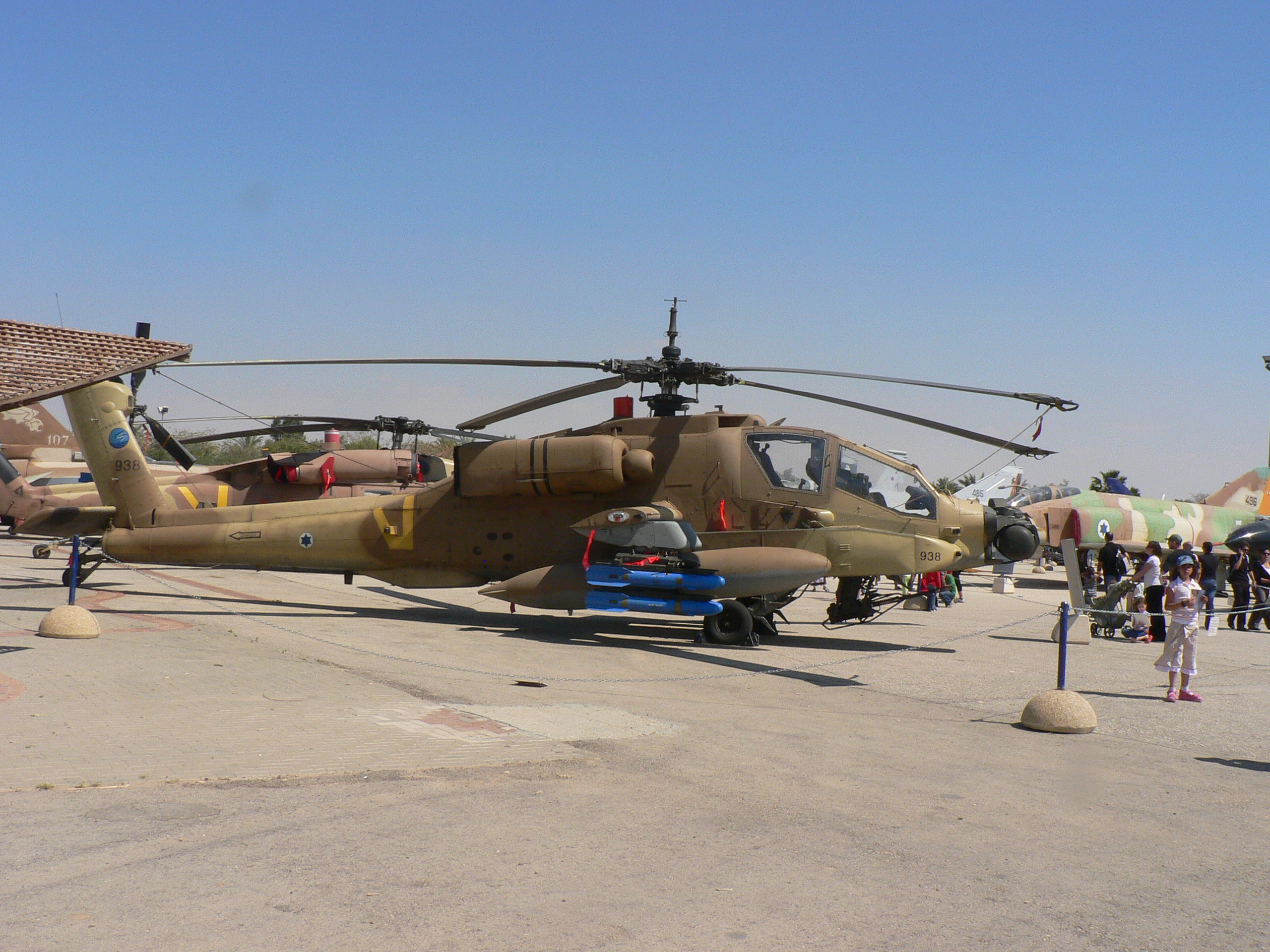 IAF AH-64A Apache Peten פתן